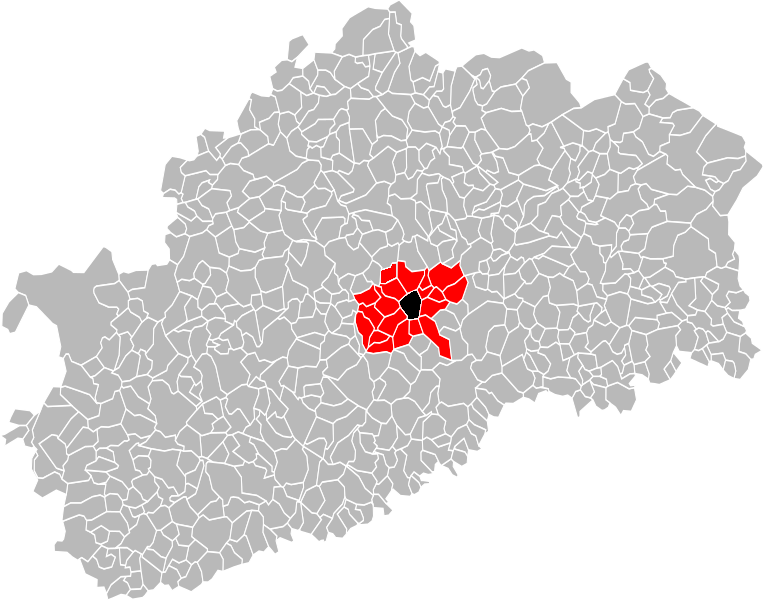 Localisation de la communauté d'agglomération de Vesoul dans le département de la Haute-Saône